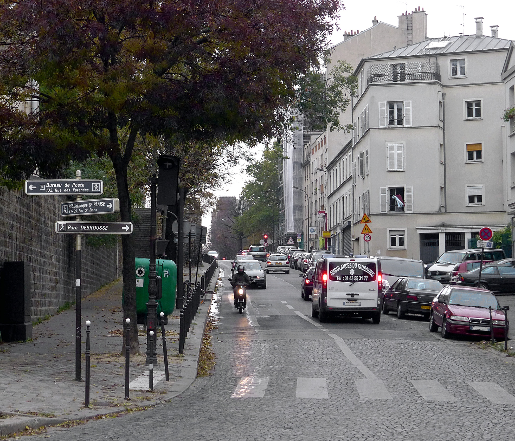 128, rue de Bagnolet - Paris XX